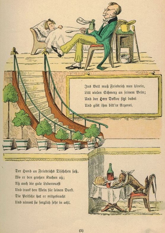 Der Struwwelpeter: Die Geschichte vom bösen Friederich Tafel 3